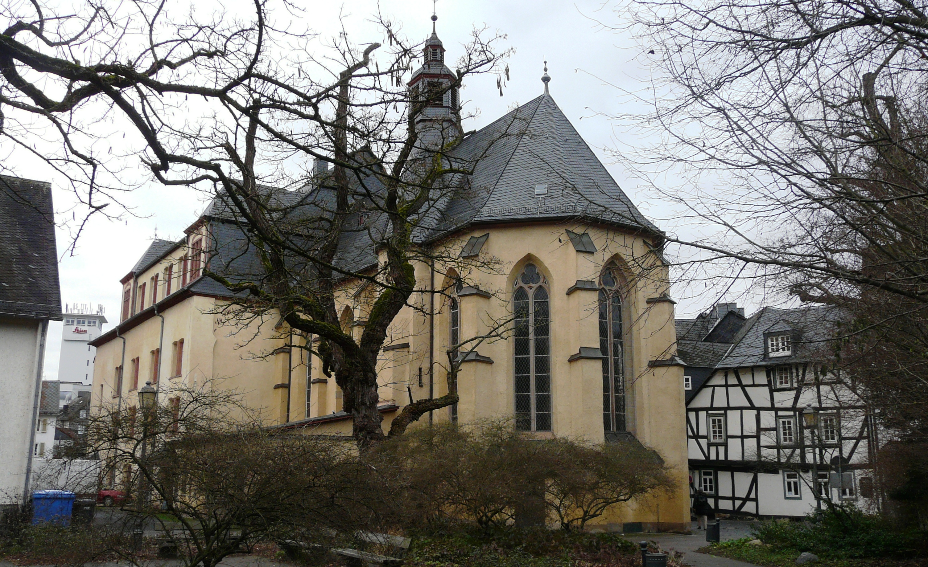 Die Untere Stadtkirche in Wetzlar, Hessen